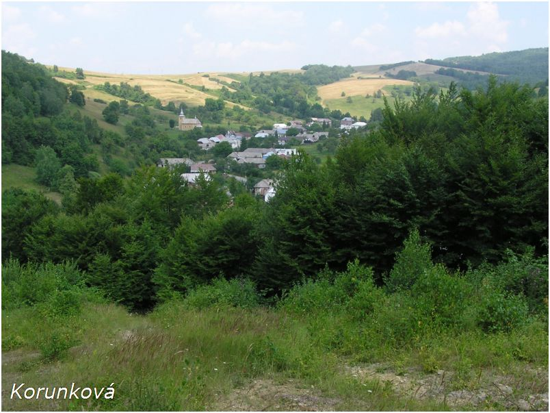 Celkový pohľad